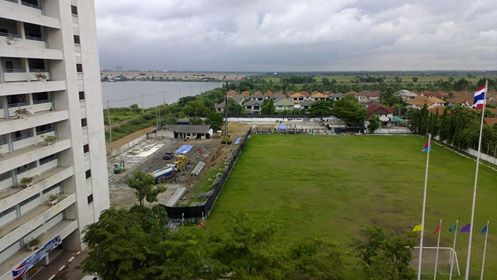 บ้านพักนักกีฬาหลังเก่า(ขณะกำลังรื้อถอน) โรงเรียนสวนกุหลาบวิทยาลัย รังสิต